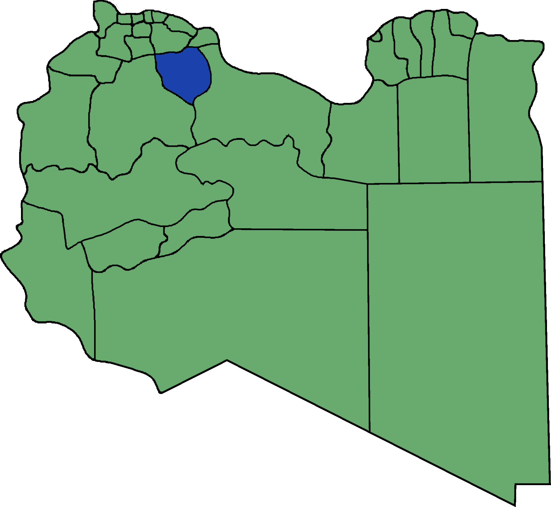 Die neuen Gemeinden (Munizipien) in Libyen. Bani Walid hervorgehoben.